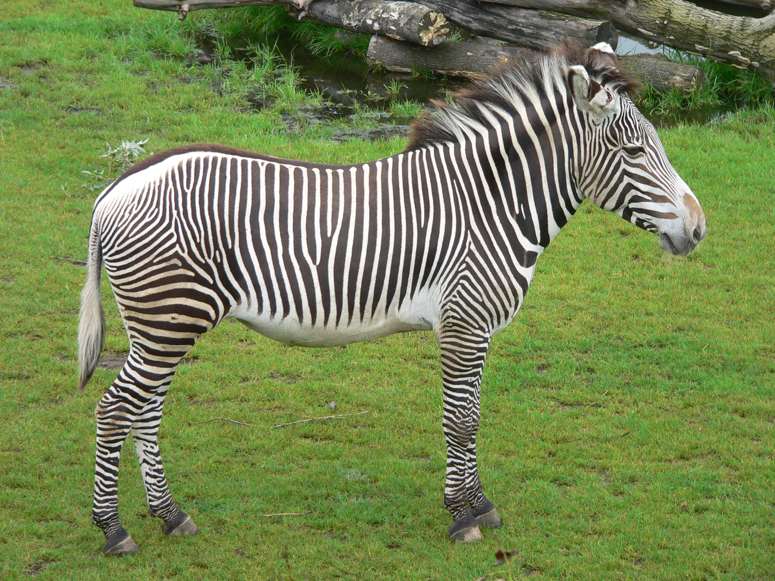 Equus grevyi, Zoo Leipzig.